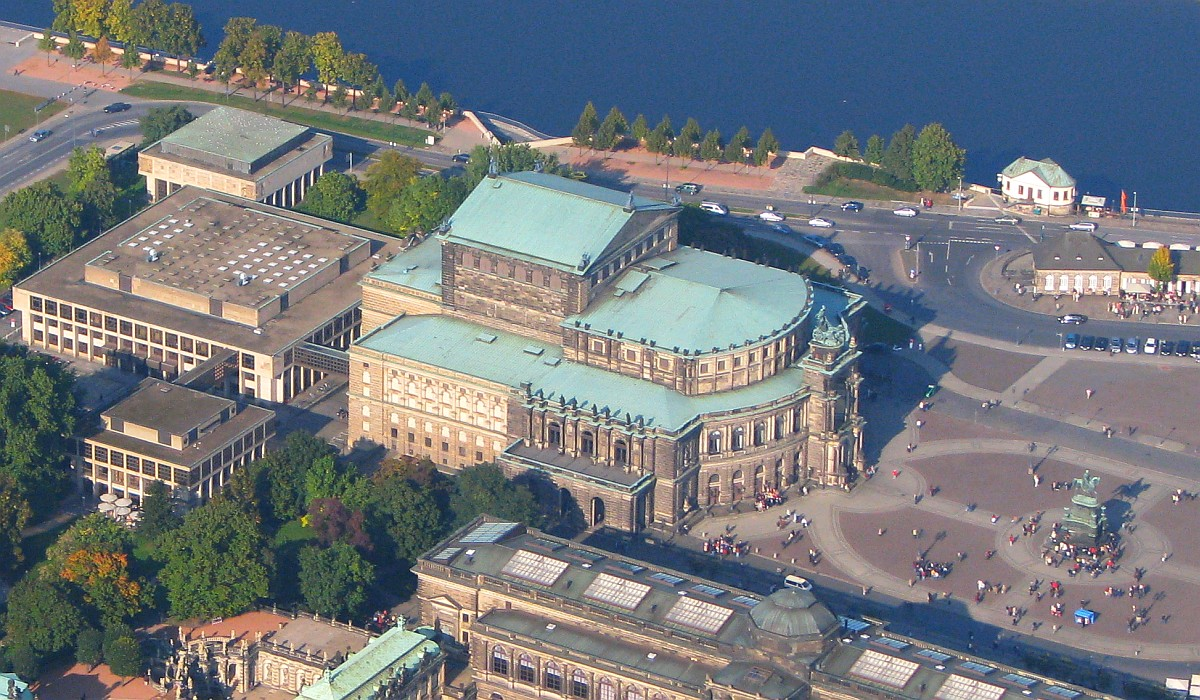 Luftbild Dresden Semperoper Theaterplatz Reiterdenkmal König Johannes Elbe Foto 2008 Wolfgang Pehlemann Wiesbaden IMG_0383